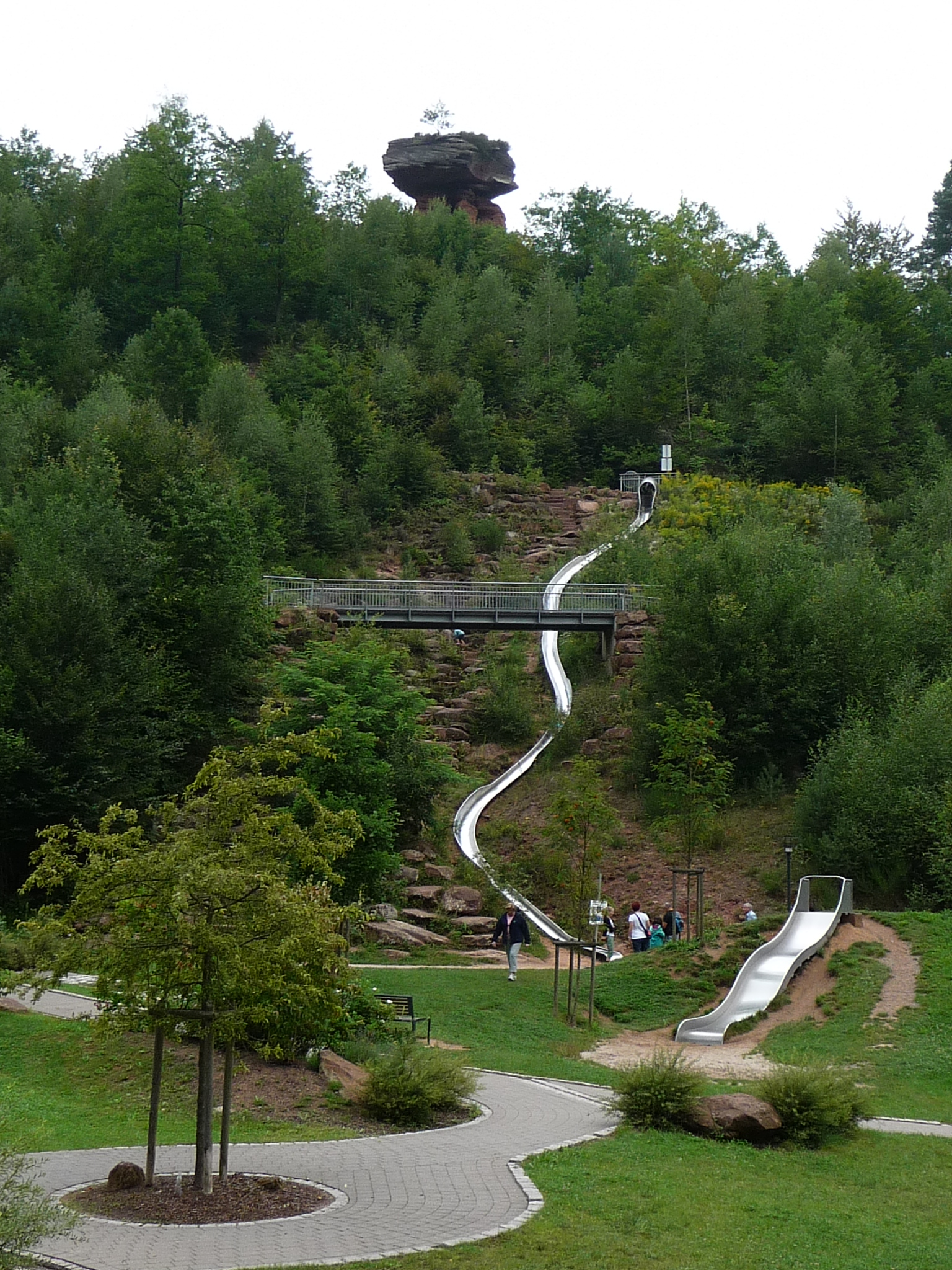 Der Teufelstisch ist ein 14 Meter hoher Pilzfelsen bei Hinterweidenthal im südlichen Pfälzerwald (Rheinland-Pfalz).